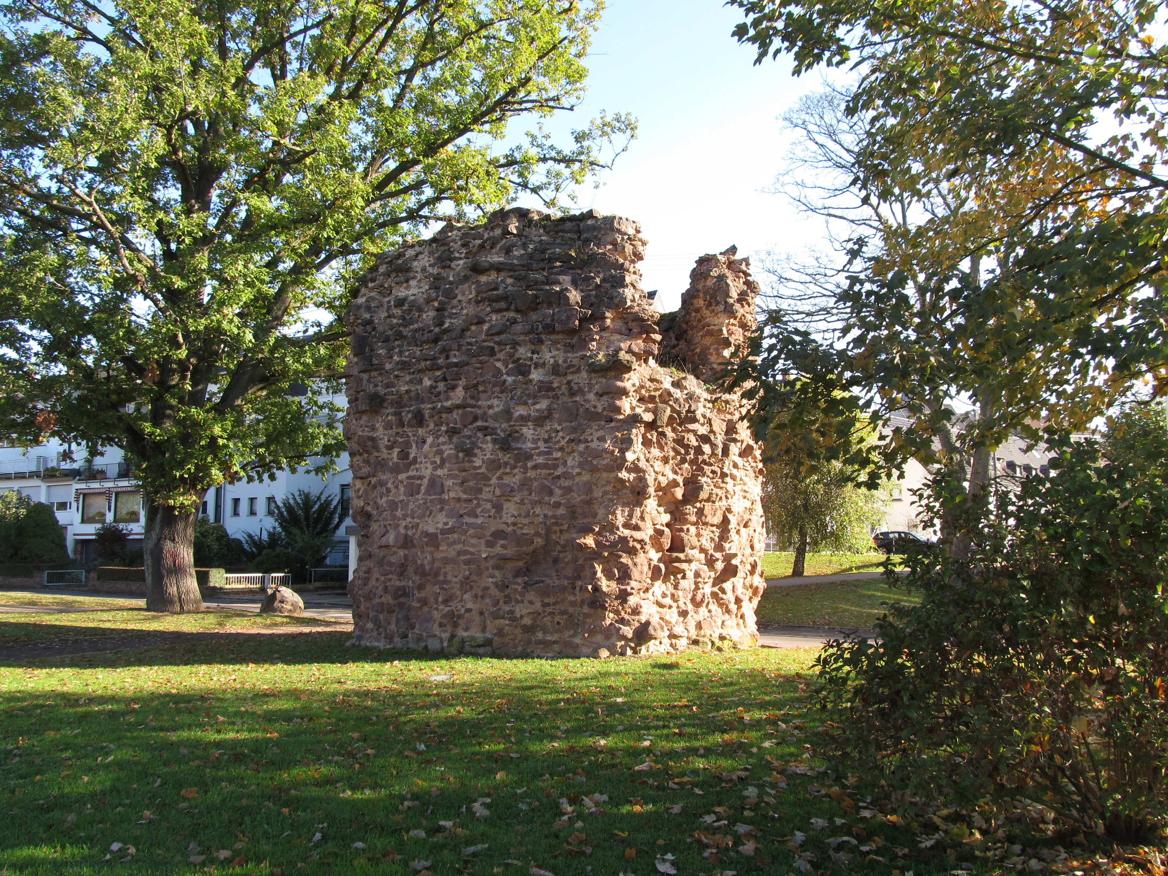 Sogenannter "Hexenturm" in Püttlingen, Saarland